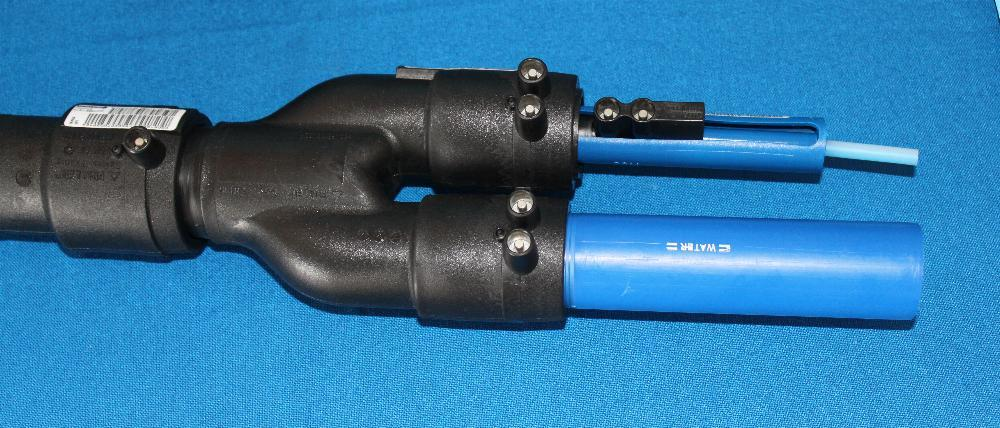 FTTB Anschluß über eine Wasserleitung. Ebenso mit Gasleitung möglich. Die Speedpipe (Leerrohr) wird mit der Y-Armatur elektrisch verschweißt. Ausstellung des Hersteller Frialen, Hausanschlußset YLASW d40/7